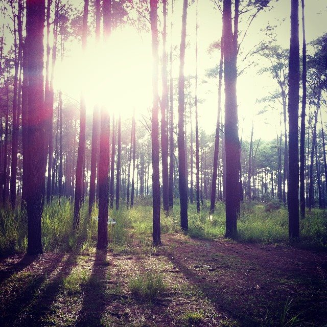 อุทยานแห่งชาติทุ่งแสลงหลวง